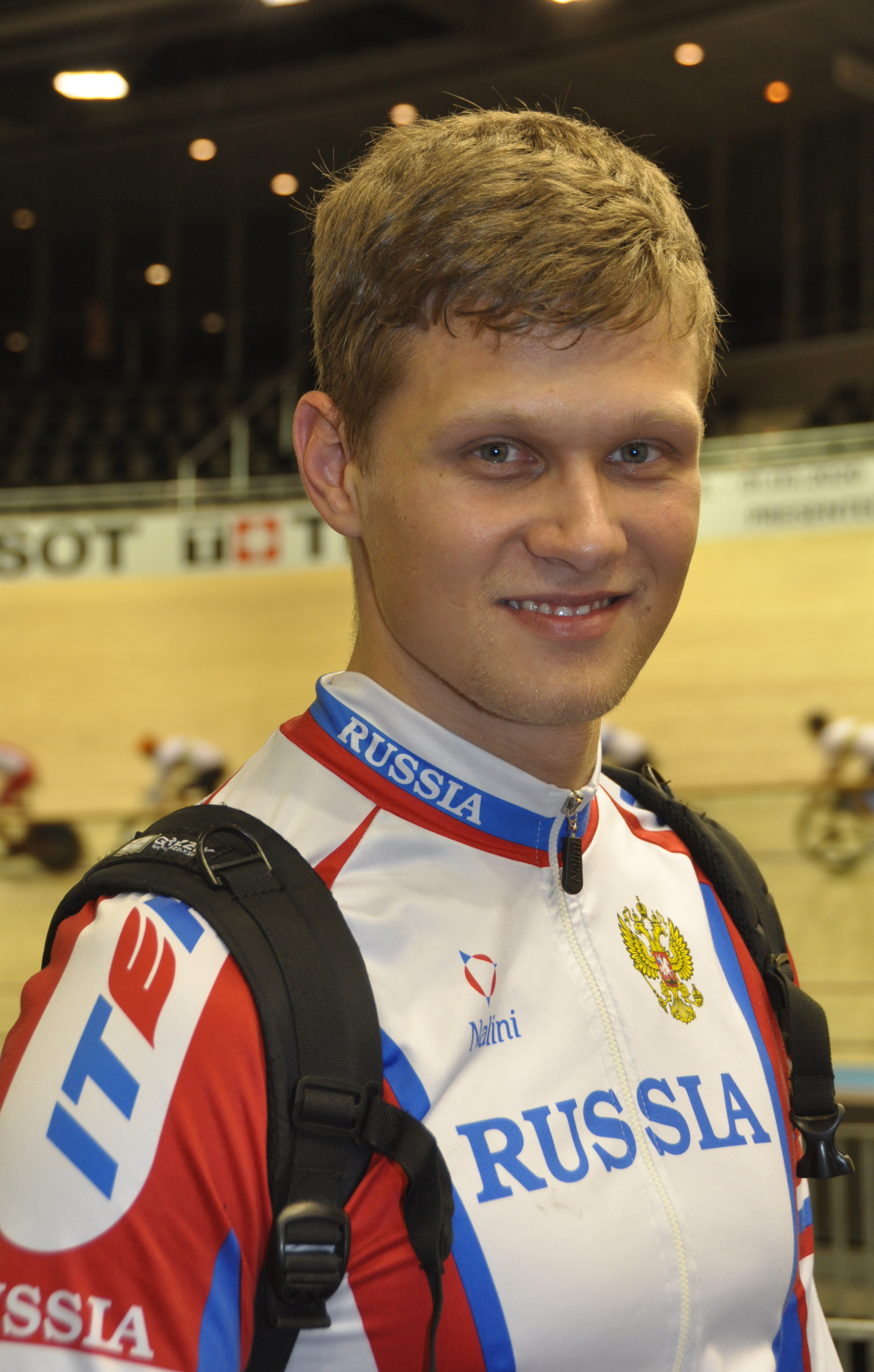 Alexandr Vasyukhno, russischer Radsportler